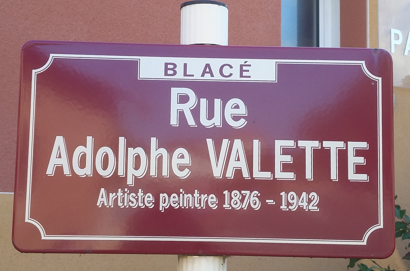 Plaque de la rue Adolphe Valette à Blacé, dans le département du Rhône.